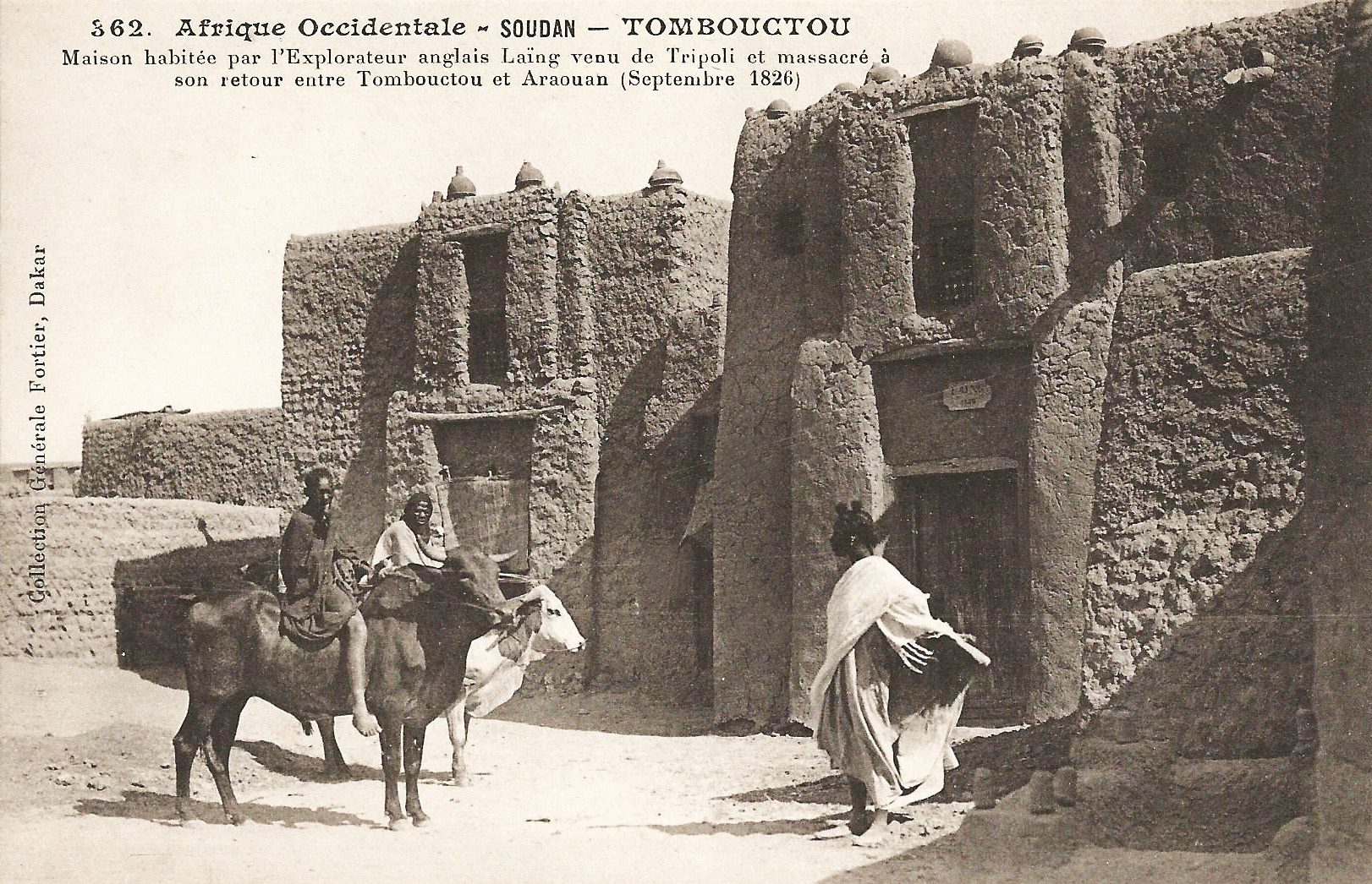 François-Edmond Fortier, Tombouctou. Maison habitée par l'explorateur anglais Laing venu de Tripoli et massacré à son retour entre Tombouctou et Araouan (Septembre 1826). Afrique Occidentale - Soudan.